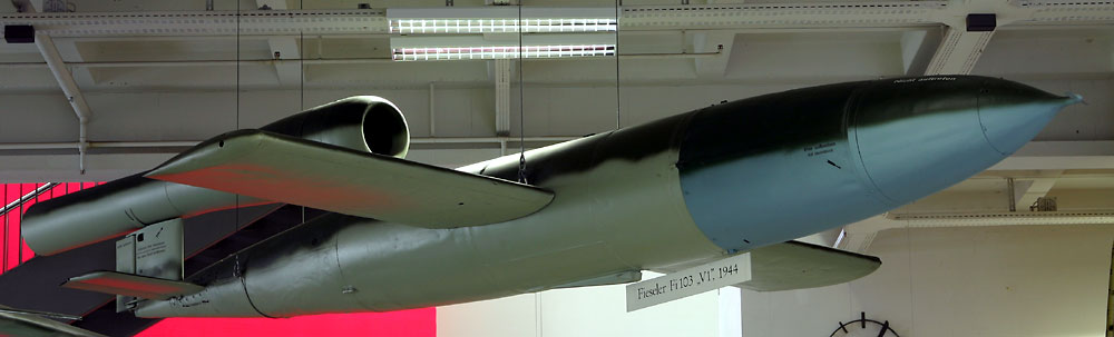 Fieseler Fi-103 im Deutschen Museum